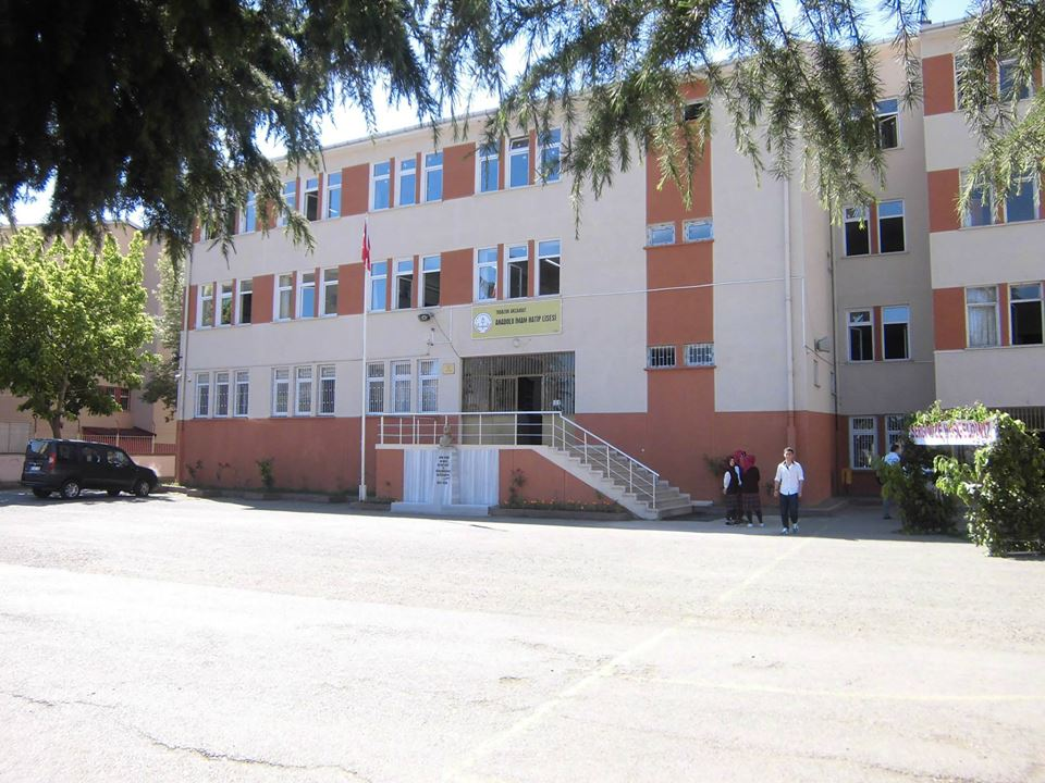 Akçaabat Anadolu İmam-Hatip Lisesi, Akçaabat Müftülüğüne ait geçici binada 1977- 1978 eğitim-öğretime yılında hizmete açıldı. Okulumuz, açılışının ikinci yılında Temel Arslan Sitesi” olarak isim yapan 2. geçici hizmet binasına taşındı. “1978- 1979 yılından itibaren 1991- 1992 öğretim yılının sonuna kadar bu binada eğitim öğretime devam edildi. “ İmam Hatip Lisesi Yaptırma ve Yaşatma Derneği’nin çalışmaları ile okulumuz, şu anda hizmet verilen binasına 1992- 1993 eğitim-öğretim yılından taşındı.1993–1994 eğitim-öğretim yılında Türkiye Diyanet Vakfı’na ait Karaman Mevkiindeki Kur’ an Kursu Binası yedi yıllığına Akçaabat İmam-Hatip Lisesi’ne tahsis edilmiş ve burası Akçaabat İmam-Hatip Lisesi ek binası olarak hizmete girmiştir. Gelişen ve değişen şartlar sonucunda 1996- 1997 öğretim yılında okulumuzda, Anadolu İmam-Hatip Lisesi bölümü açılmıştır. Okulumuz, 1999–2000 eğitim öğretim yılından itibaren sadece lise kısmı ile eğitim ve öğretime devam etmiştir. 1999–2000 Öğretim yılında okul mevcudunun azaldığı ve merkez binanın tüm öğrencileri rahatlıkla istihdam edeceği anlaşıldığından Karaman mevkii ek binasındaki öğrenciler merkez binaya taşınmıştır. Açıldığından günümüze kadar üç bine yakın mezun veren, 33 yıllık bir maziye sahip olan okulumuzda, Mart 2010 tarihinden itibaren TKY uygulamaları çerçevesinde hızlı bir gelişim ve değişim süreci başlatılmış ve okulumuz bugünkü modern görünümüne kavuşturulmuştur. 2010–2011 eğitim öğretim yılı itibarı ile okulumuzda 1 müdür, 2 müdür yardımcısı, 36 öğretmen ve 4 personel hizmet vermektedir. Okulumuzda 21 derslik ve 490 öğrenci bulunmaktadır. Okulumuzda; 1977-83 yılları arasında Emin BALTA, 1983-84 yılları arasında Hidayet YAVAŞ, 1984-87 yılları arasında Mehmet YAYLI, 1987-2003 yılları arasında Miktat EYÜPOĞLU, 2003-2009 yılları arasında Alaattin ODABAŞI müdür olarak görev yaptı.